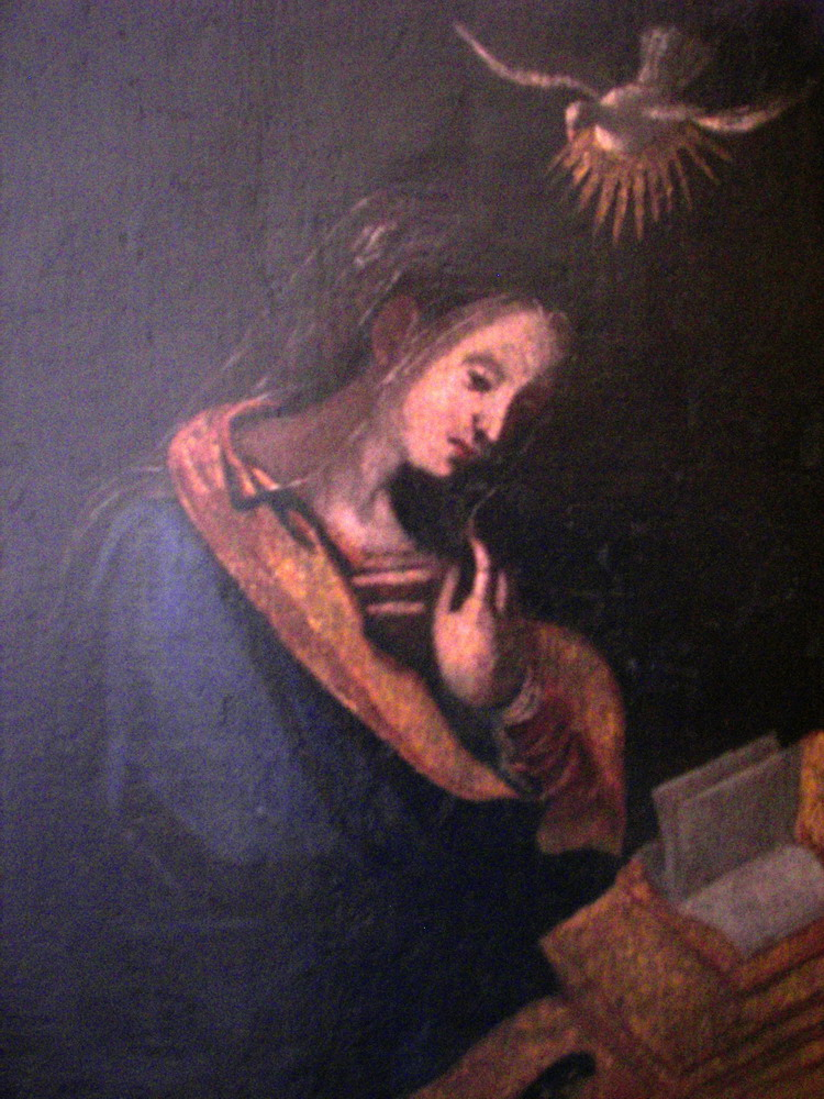 Vergine Annunciata. Olio su tela di scuola siciliana, secolo XVII. Chiesa Madre di Santa Maria di Licodia Eubea